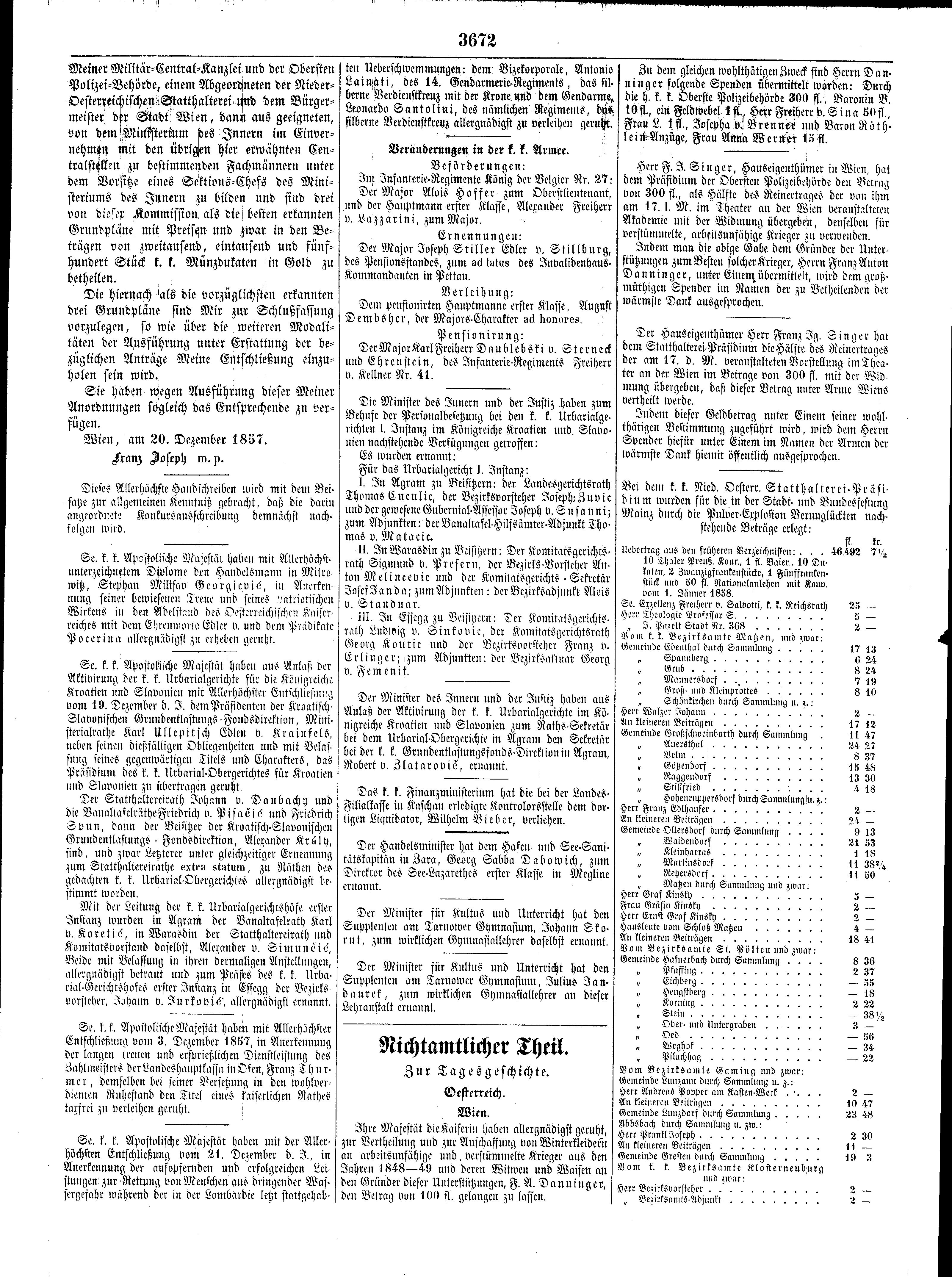 Wiener Zeitung vom 25.12.1857 Seite 1 mit dem „Handschreiben“ Kaiser Franz Josefs I. zur Stadterweiterung